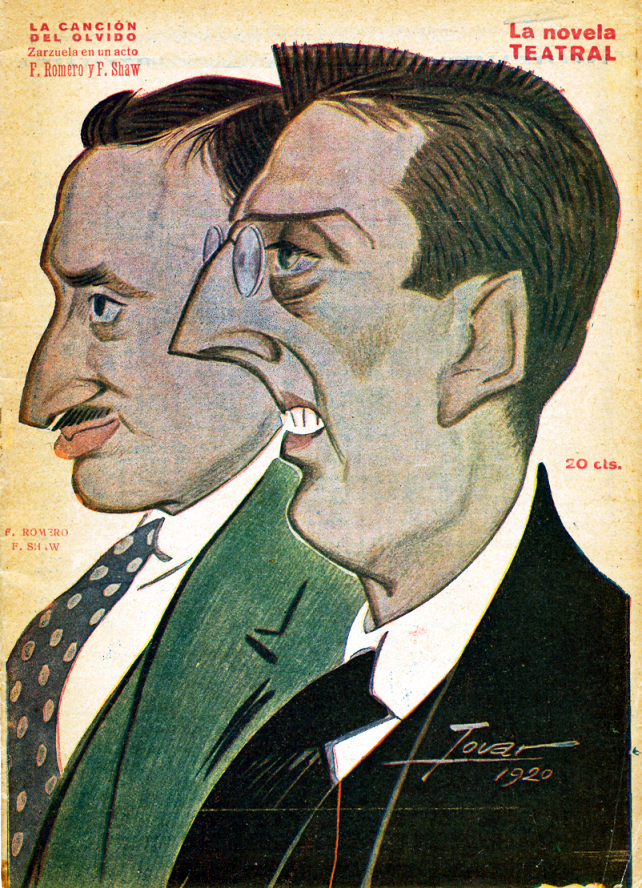 Guillermo Fernández Shaw y Federico Romero.